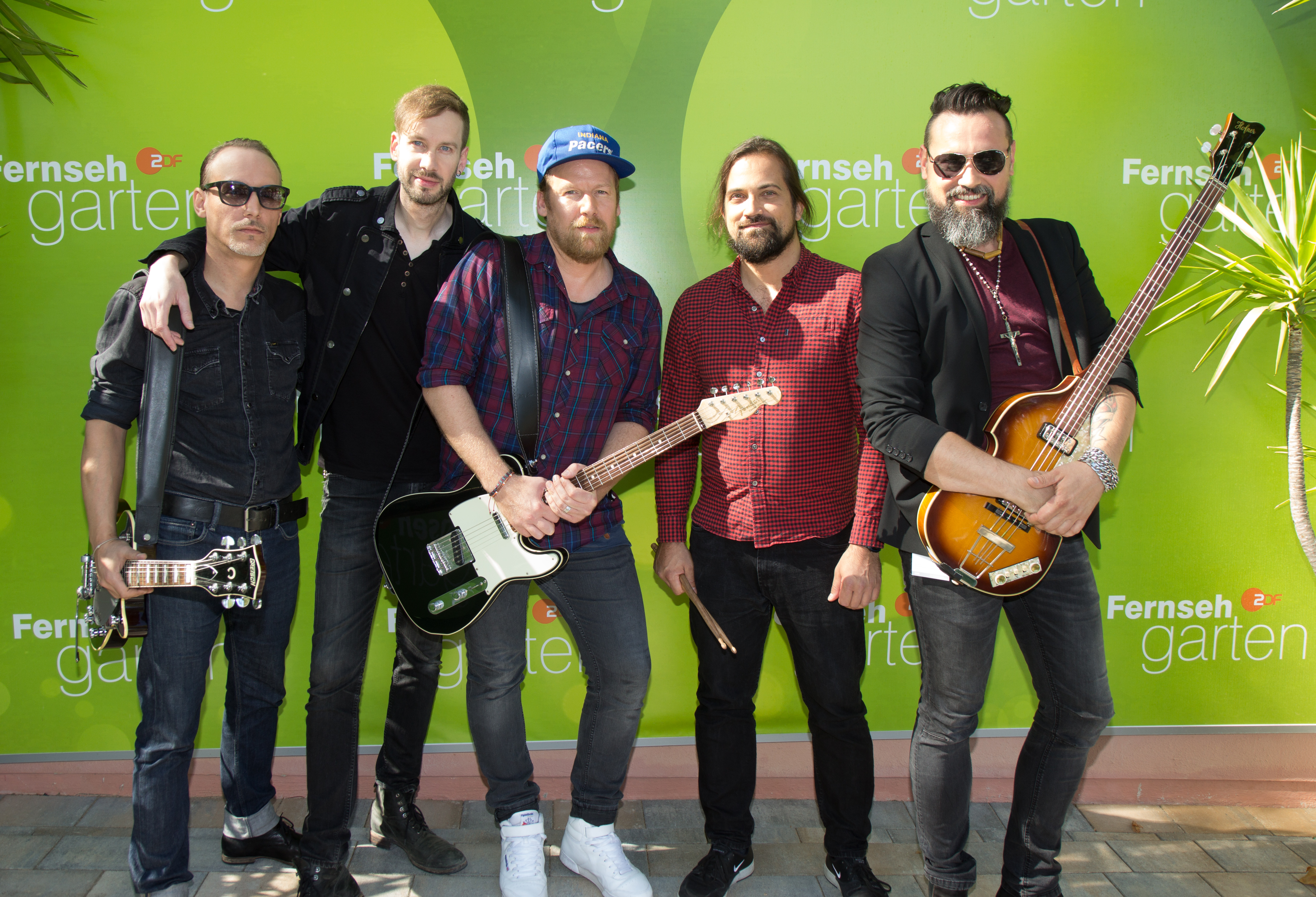 Kensington Road als Gast im ZDF-Fernsehgarten am 16. September 2018 in Mainz.